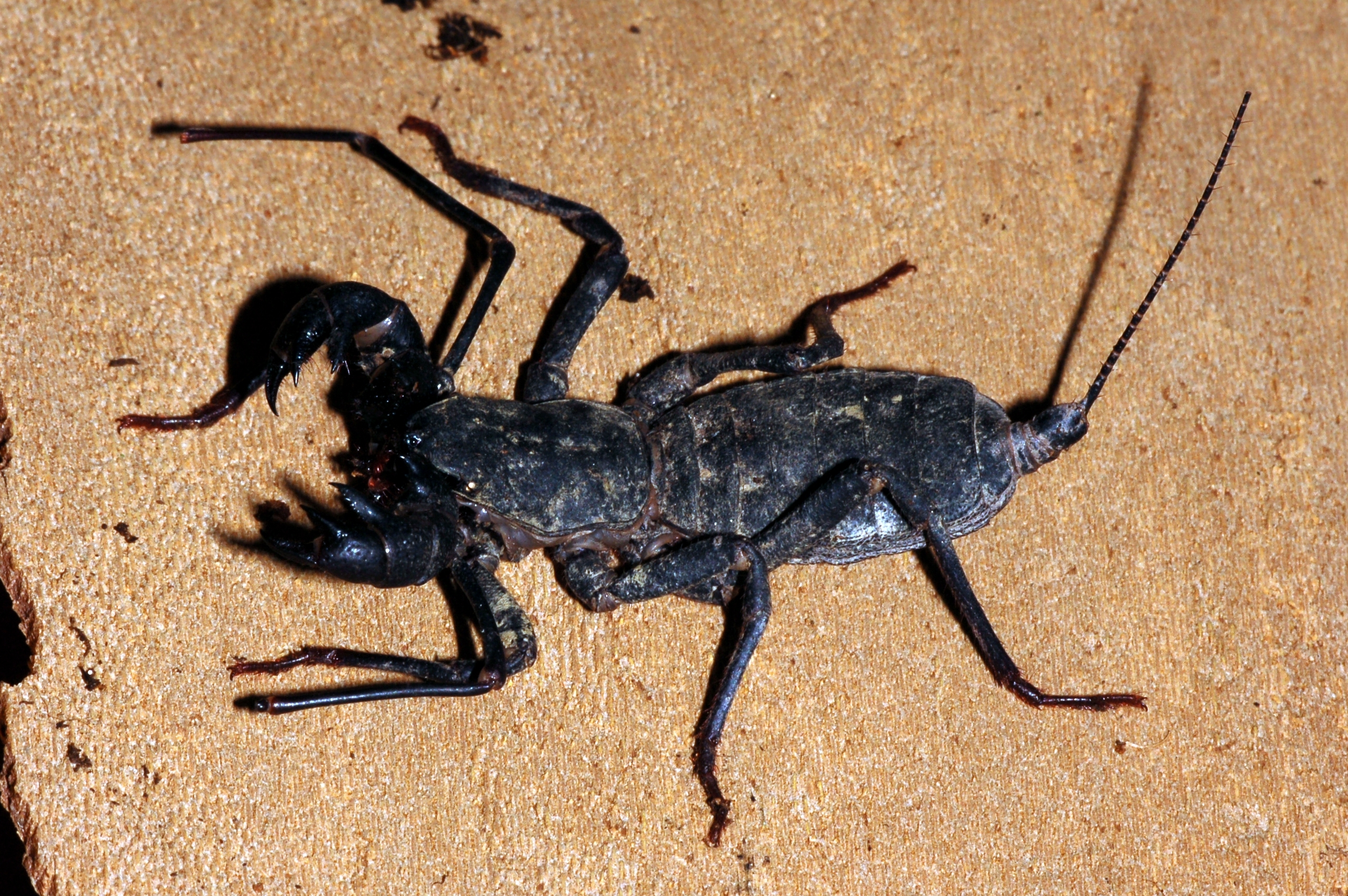 Typopeltis species (Uropygi: Typopeltinae) in Gefangenschaft, Museum Wiesbaden, Deutschland